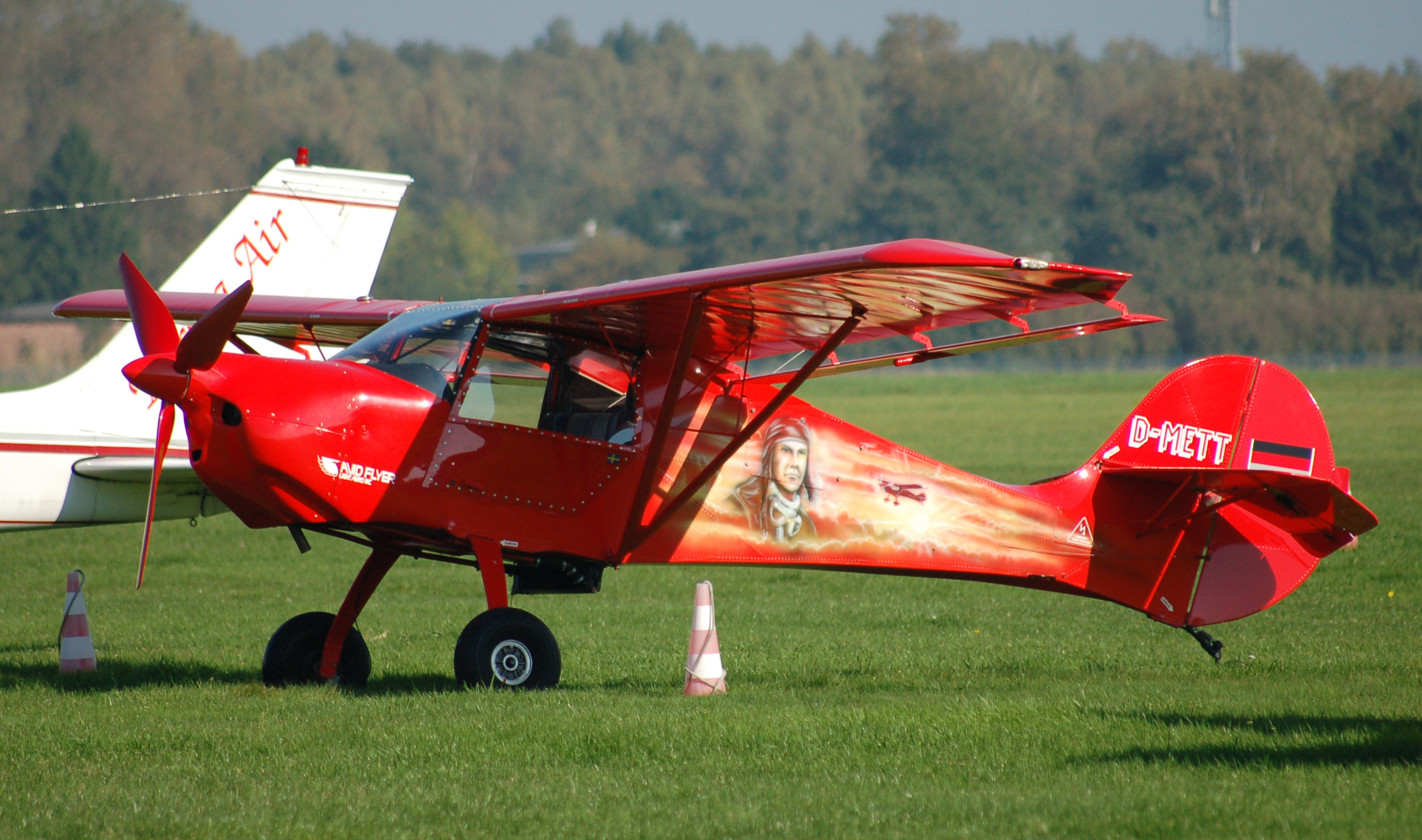 AVID Flyer (D-METT) auf dem Flugplatz Uetersen